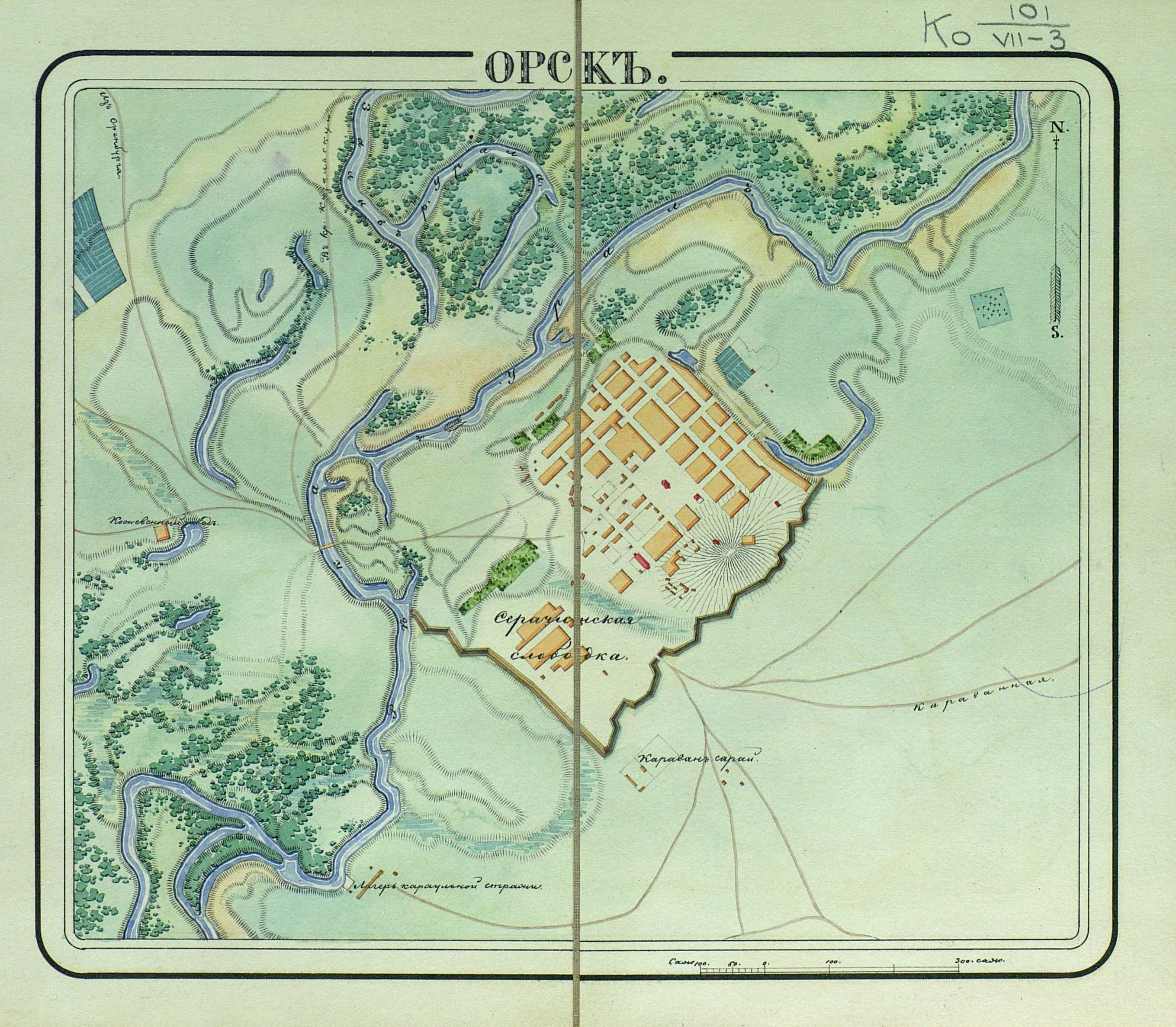 Орск.